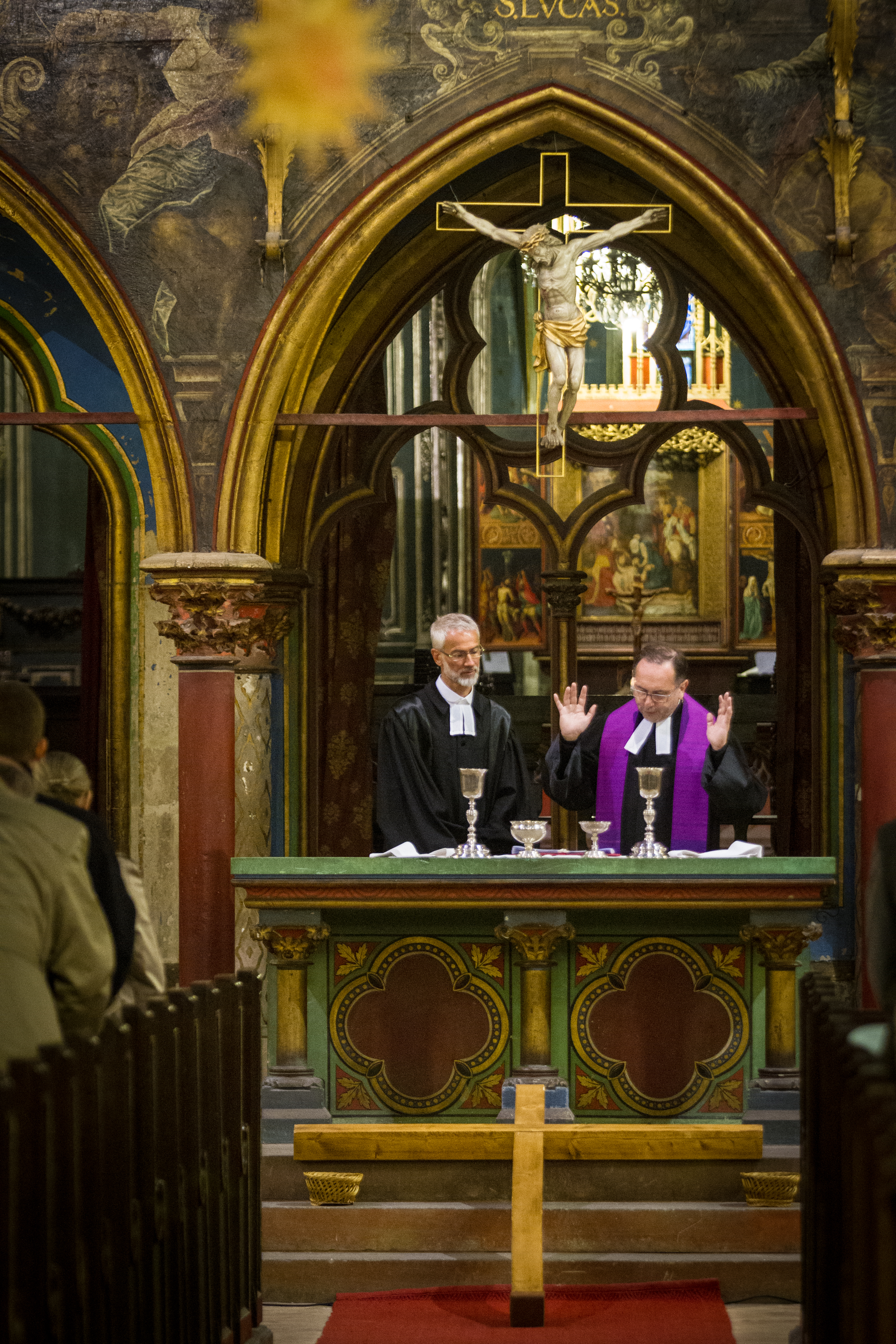 Culte de Sainte Cène église protestante Saint-Pierre-le-Jeune Strasbourg 18 avril 2014 avec les pasteurs Philippe Eber et Eric Schiffer.